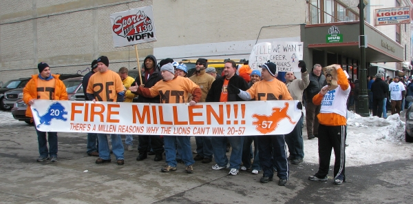 Angry Detroit Lions fans protest Matt Millen.